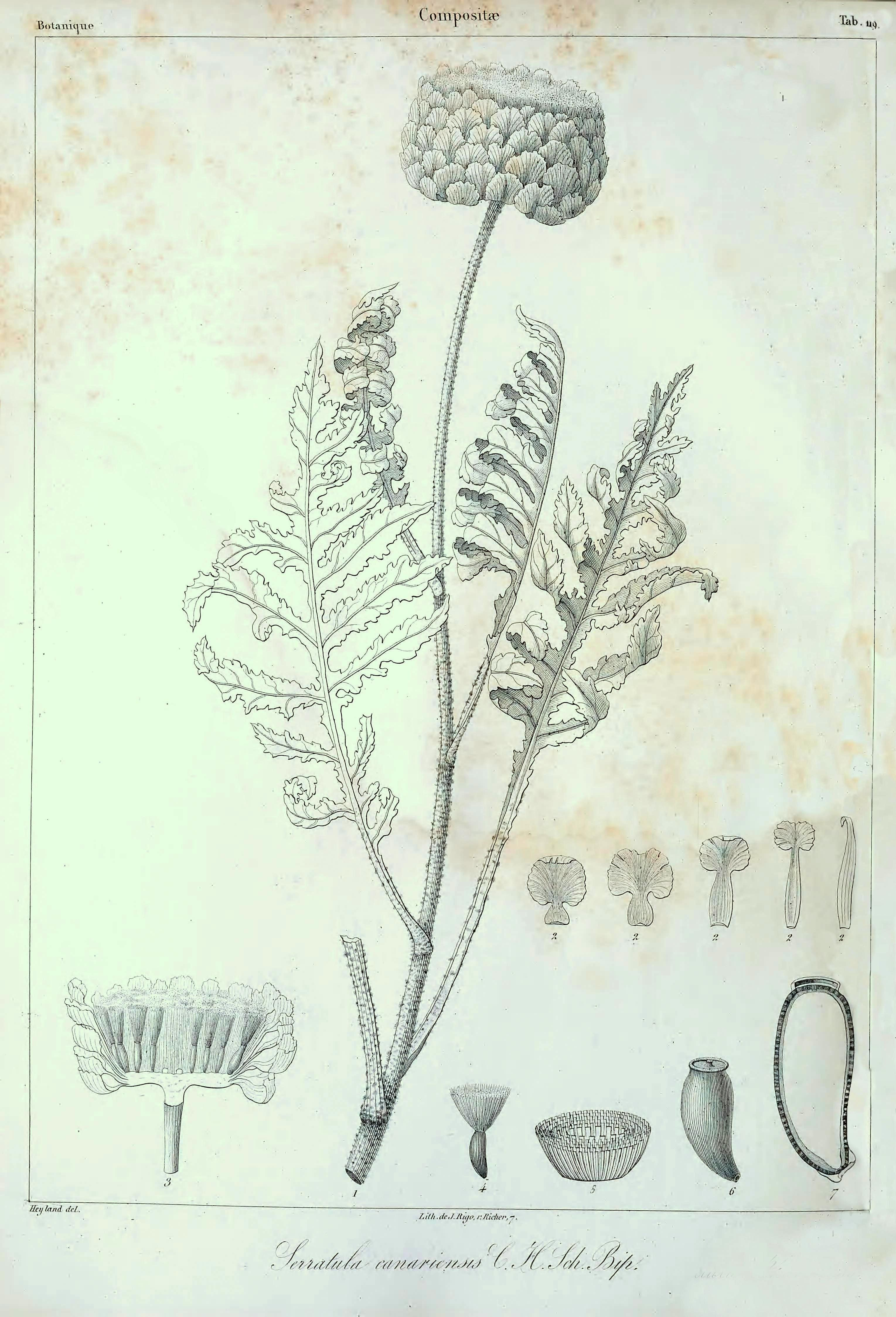 Rhaponticum canariense (como Serratula canariensis) en Webb P.B. & Berthelot S., Histoire Naturelle des Îles Canaries, 1846. Leyenda: 1: Parte superior del tallo con capítulo en fructificación; 2: Serie de brácteas involucrales (de exterior hasta interior); 3: Capitulo en fructificación en corte axial; 4: Cipsela con su vilano; 5: Base del vilano suelto; 6: Cipsela sin su vilano; 7: Cipsela sin su vilano cortada longitudinalmente.